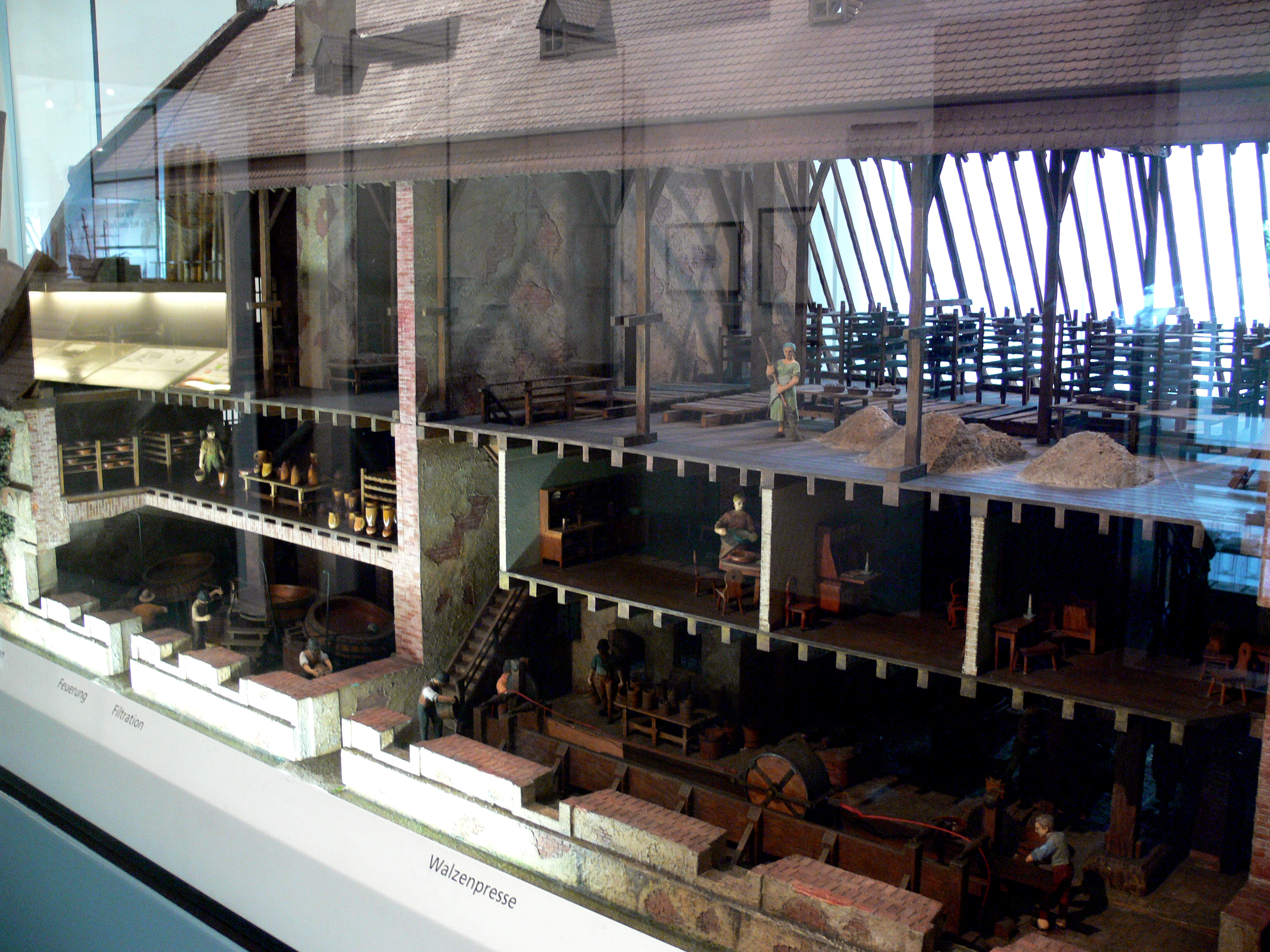 Modell der ersten Rübenzuckerfabrik in Cunern/Schlesien, 19. Jh. (Modell von 1936); Zucker-Museum, Berlin